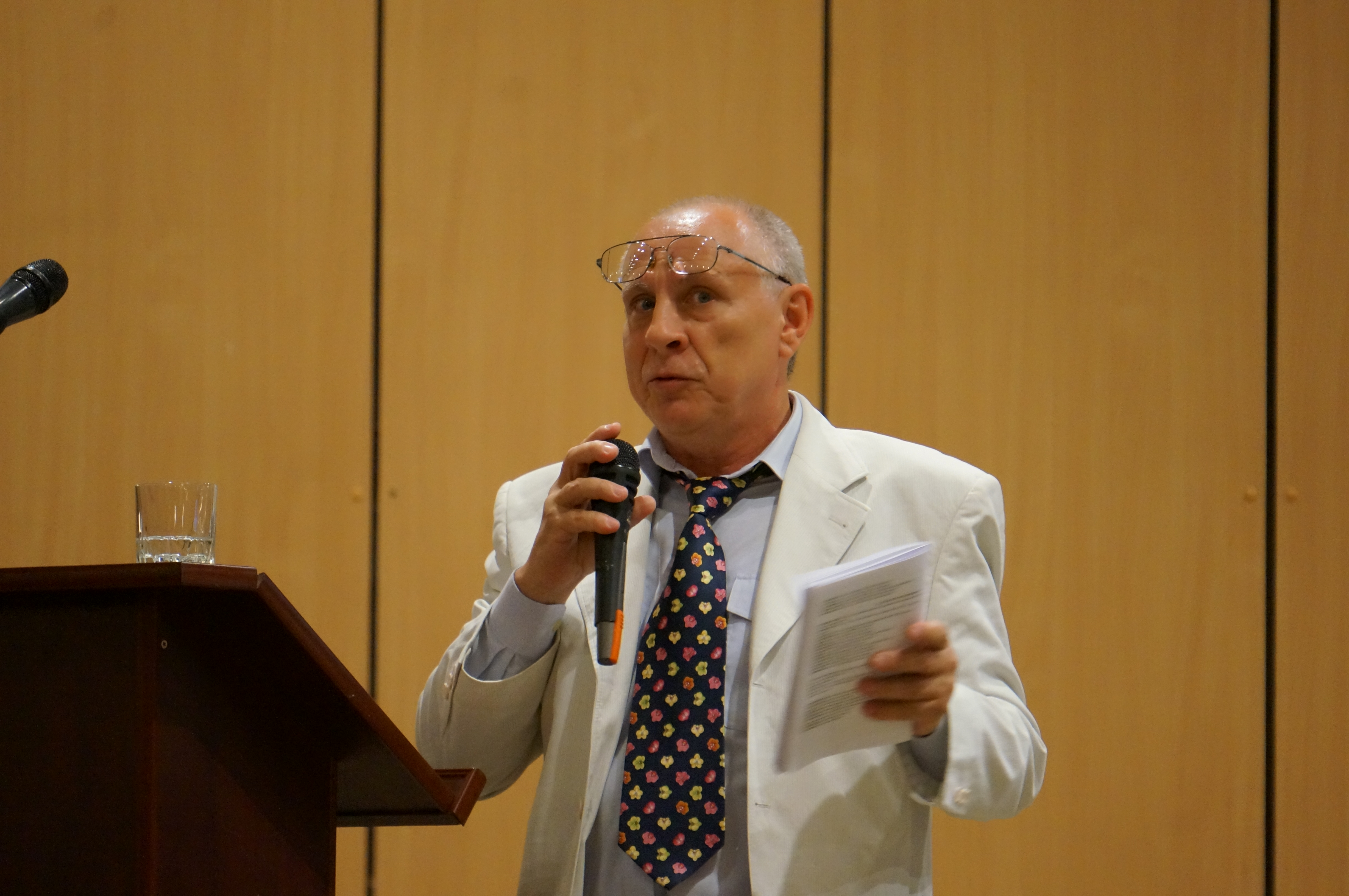 Леонид Владимирович Аверьянов. XIII съезд Русского ботанического общества. Тольятти, 2013 год.